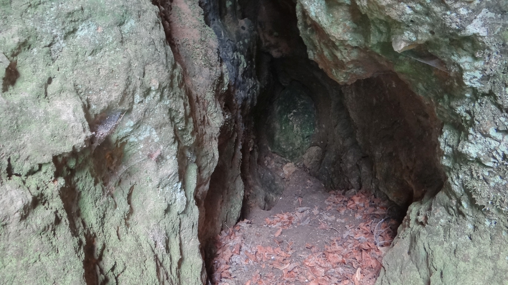 Komin Prawej Nogi Baby w skałach Dudnik w Podlesicach